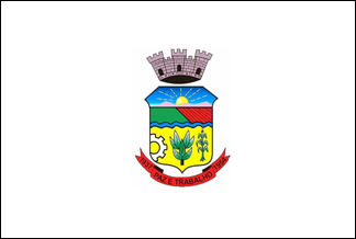 Bandeira da Cidade de Horizontina/RS